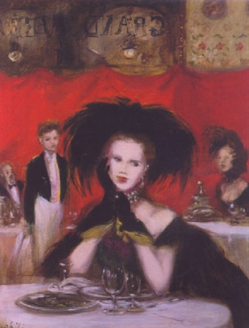 éranzando al Grand Véfour, olio su tela, 92.1 x 73 cm, coll, privata